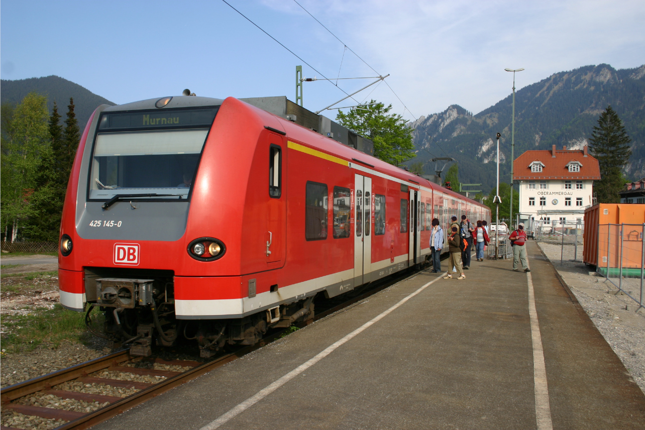 Bahnhof Oberammergau 2007 - jetzt HP